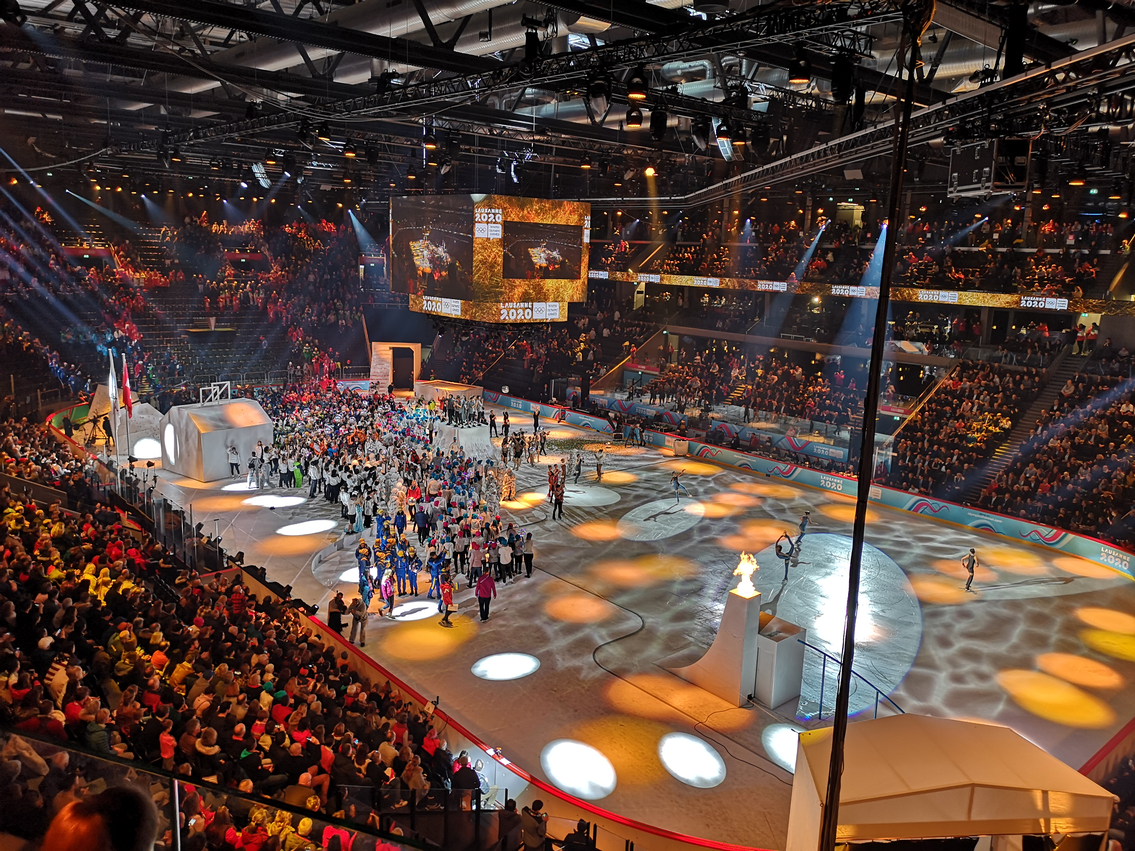 La sortie des athlètes à la fin de la cérémonie d'ouverture des JOJ 2020.